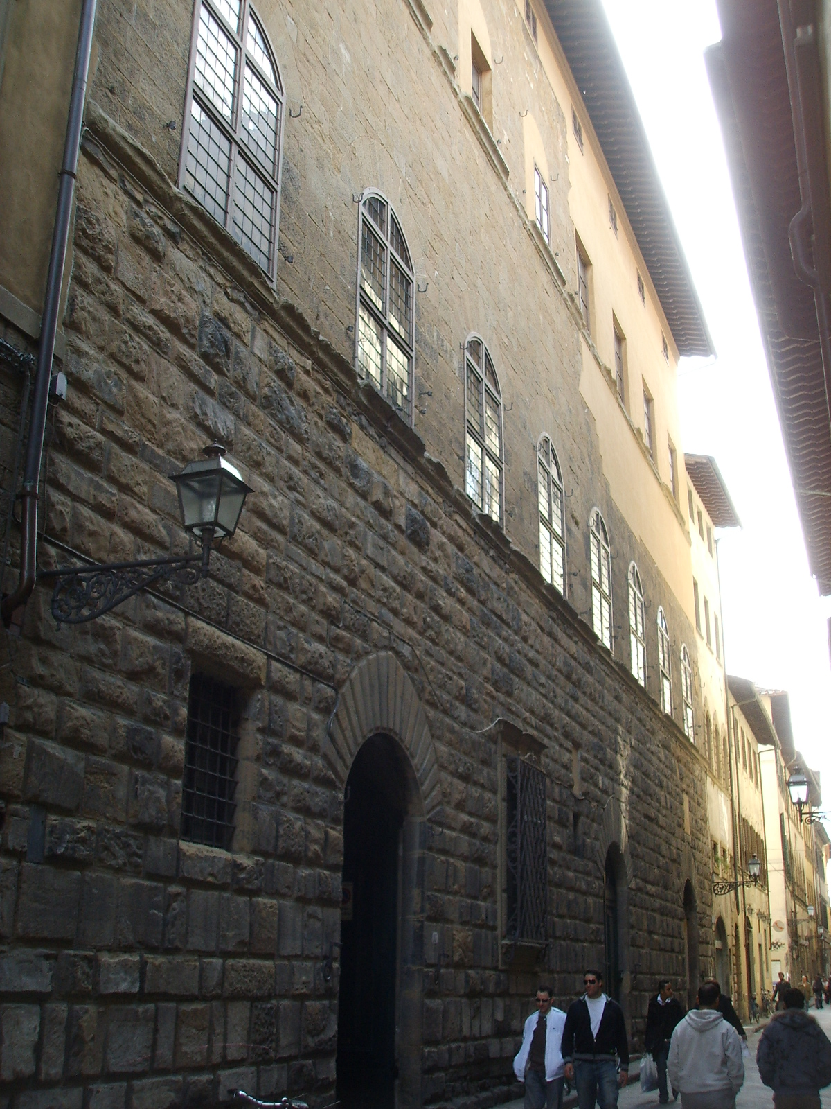 Palazzo degli alessandri